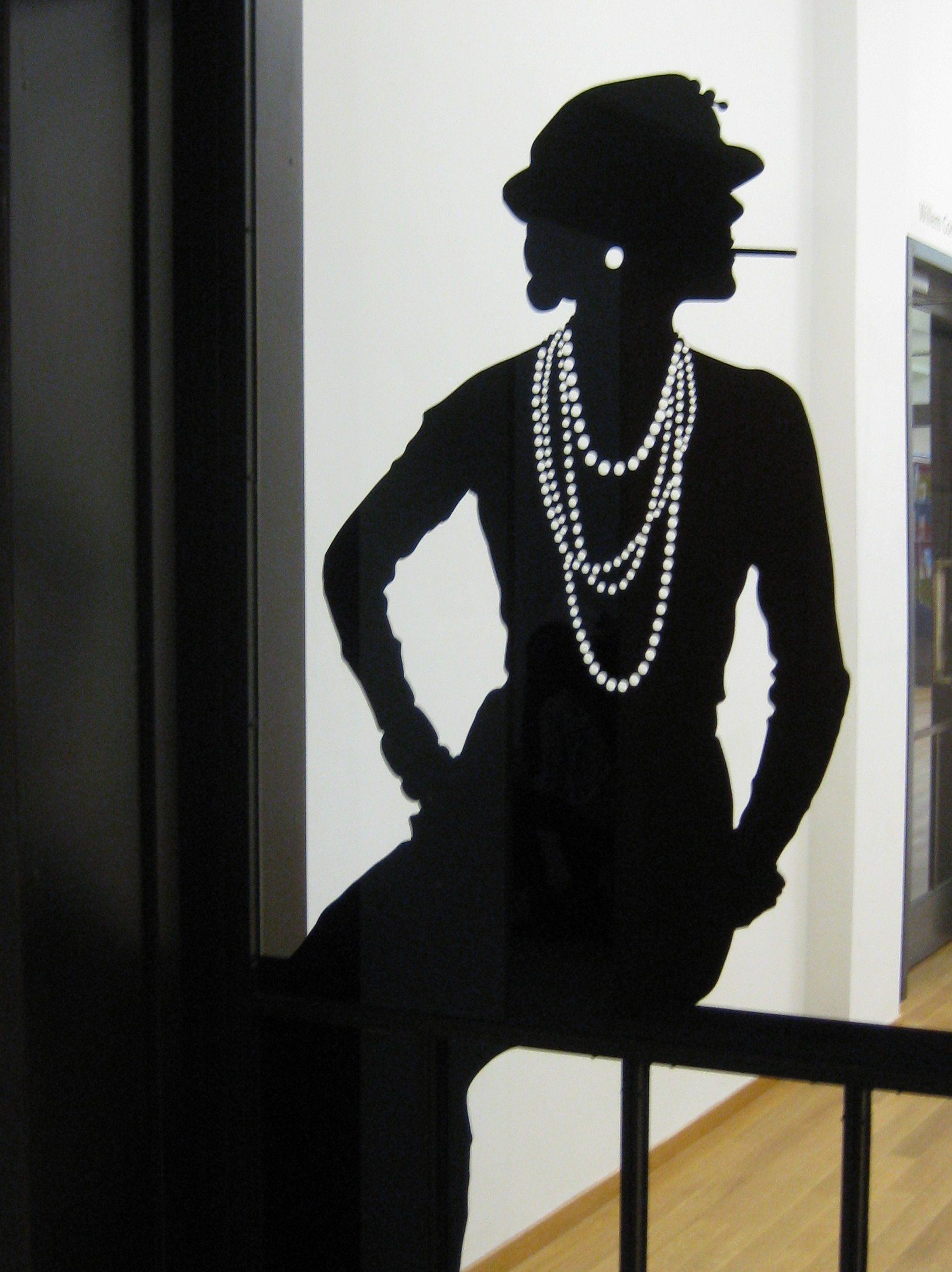 Afbeelding van Coco Chanel tijdens de tentoonstelling Chanel:De Legende in het Gemeentemuseum Den Haag.